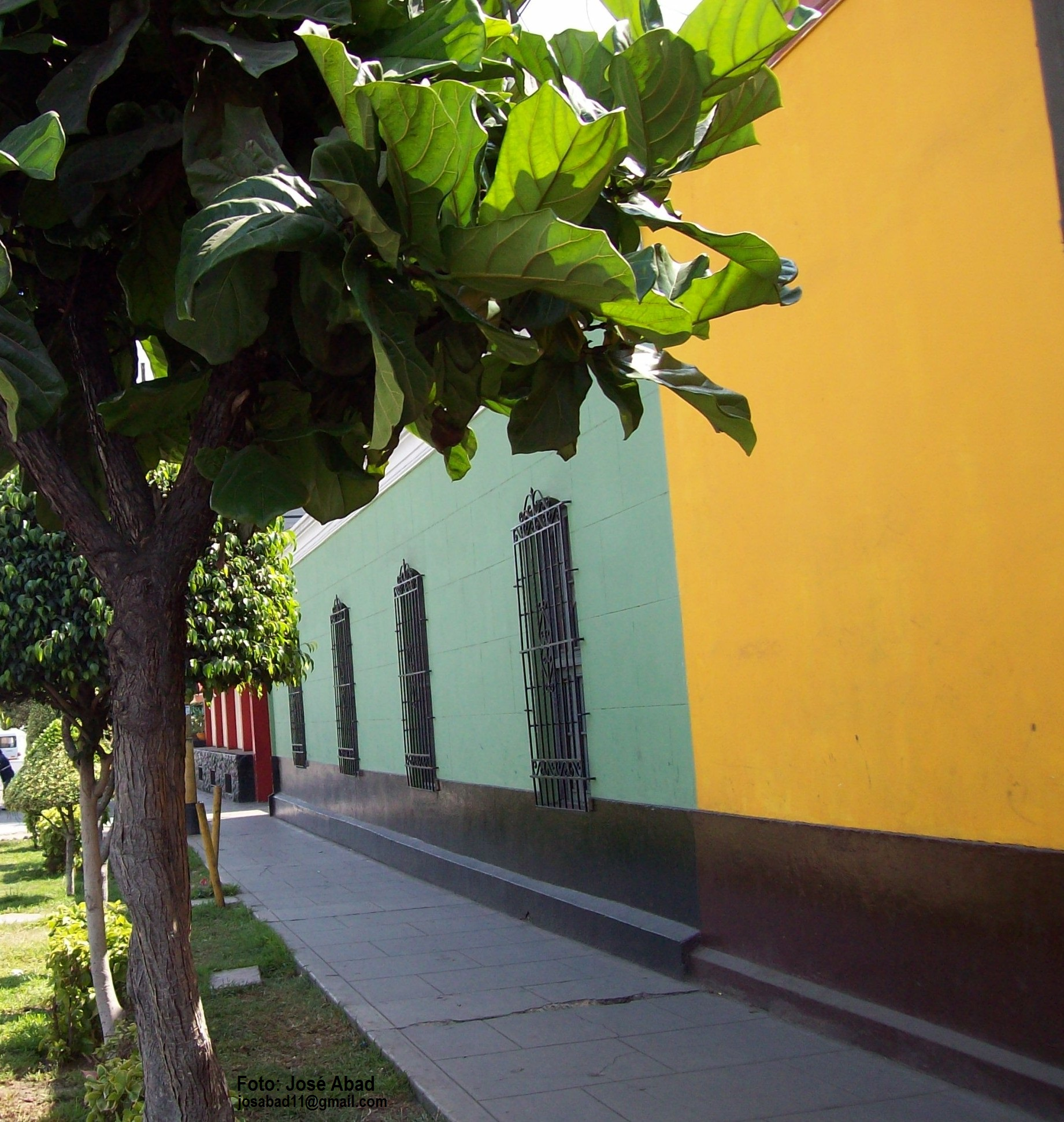 Estatua de **Santa Rosa de Lima** en el colegio "Rosa de Santa María**, ubicado en el Jirón Carhuaz, en el distrito de Breña.